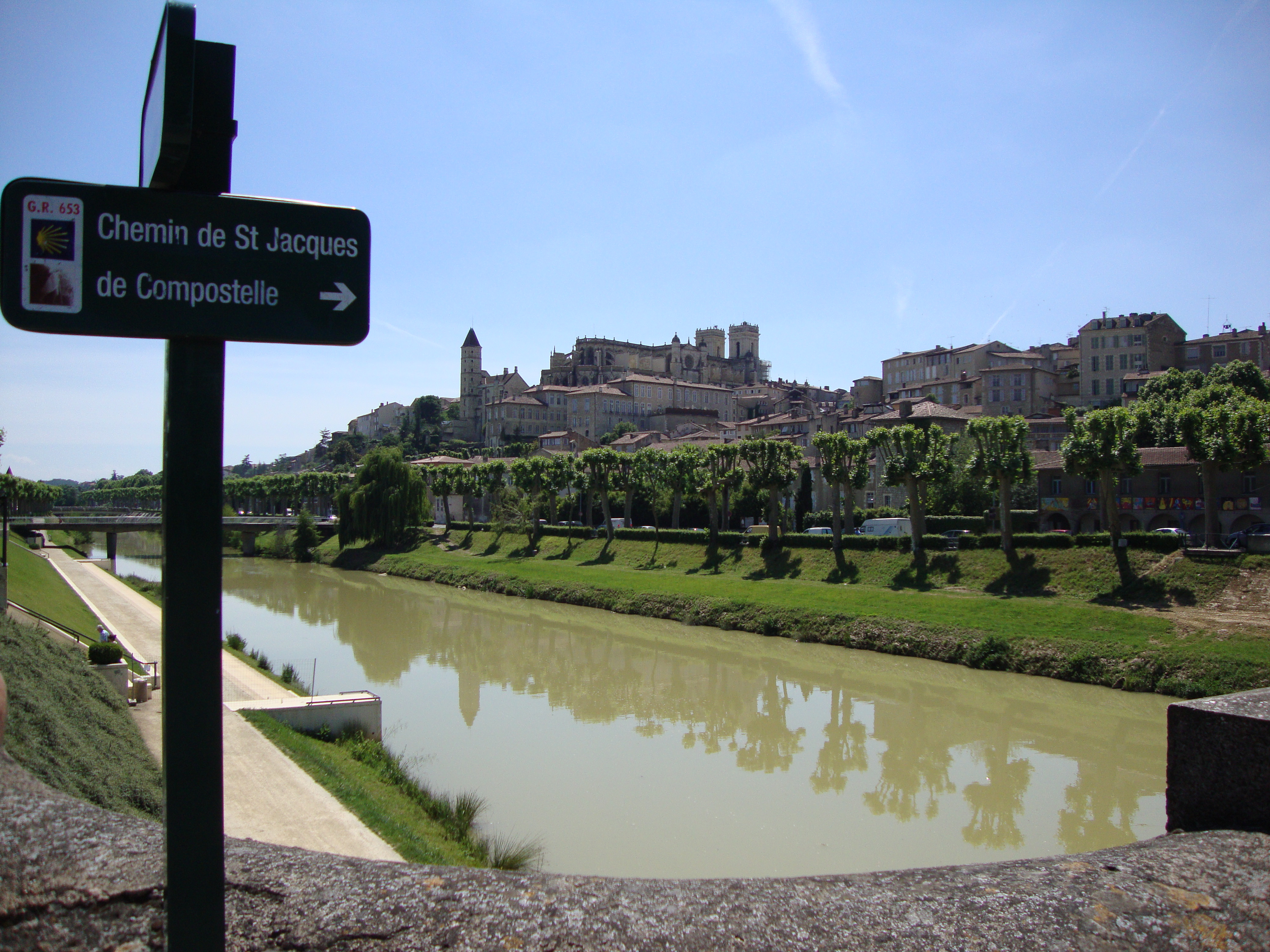 Auch (Gers, Fr) sur le chemin de St.Jacques. La ville et la chatédrale vue du pont sur le Gers